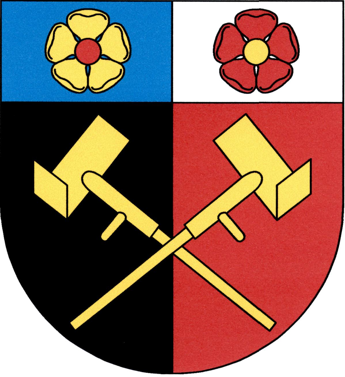 Česky: znak obce Borkovice